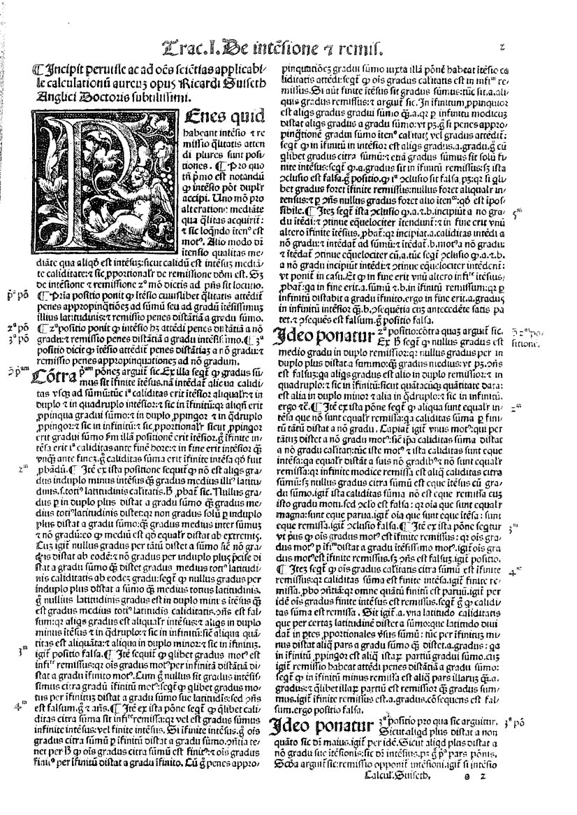 Incipit